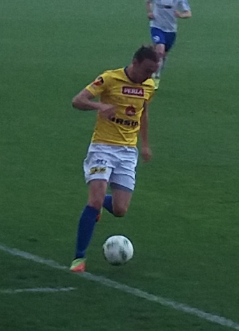 Kamil Majkowski - Motor Lublin 2017